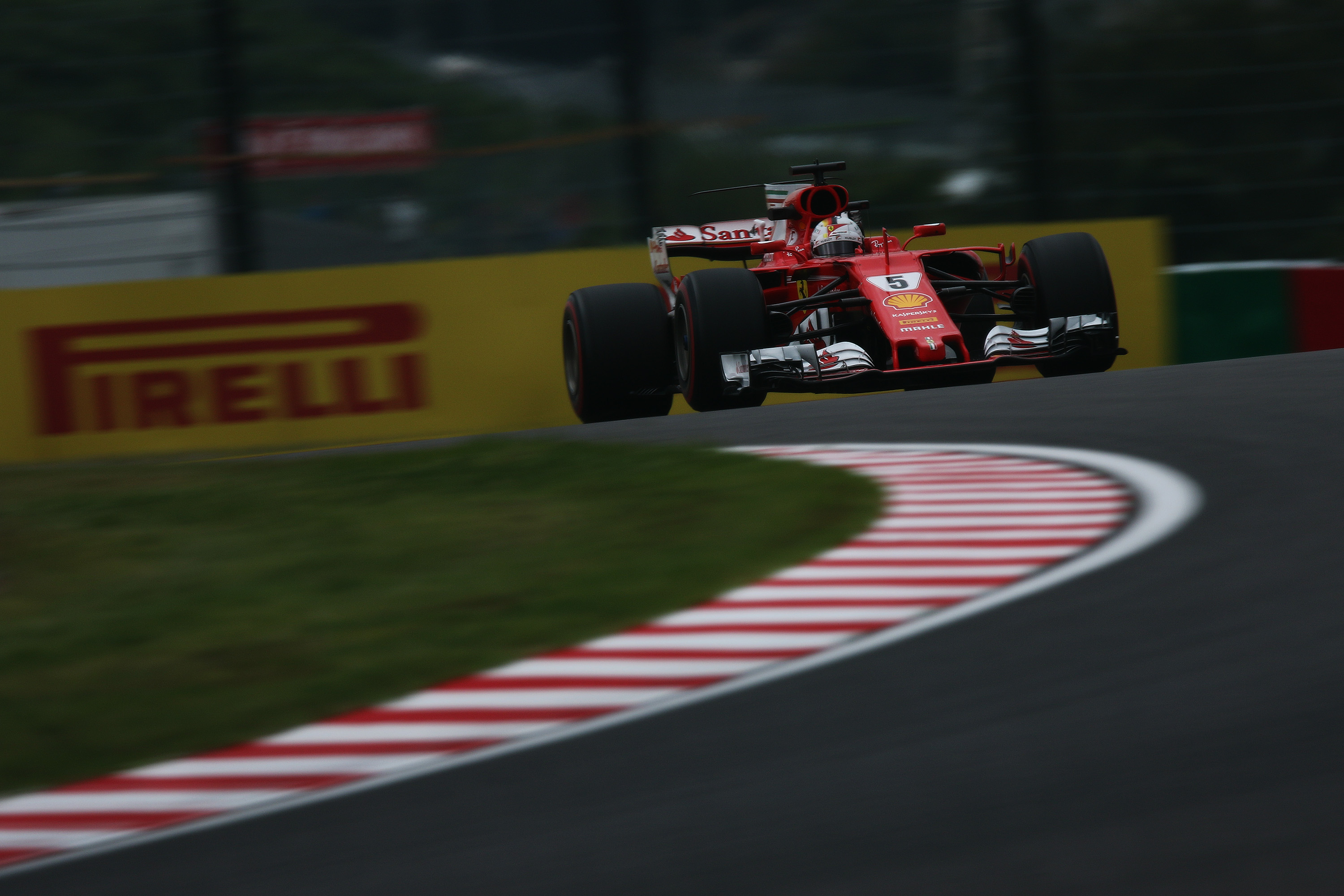 2017.10.6 F1 Rd.16 Japanese GP SUZUKA (FP1) Scuderia Ferrari (SF70H) 5 セバスチャン・ベッテル [7D2_0827ks]